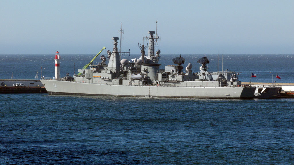 Die chilenische Fregatte Almirante Latorre im Hafen von Valparaíso